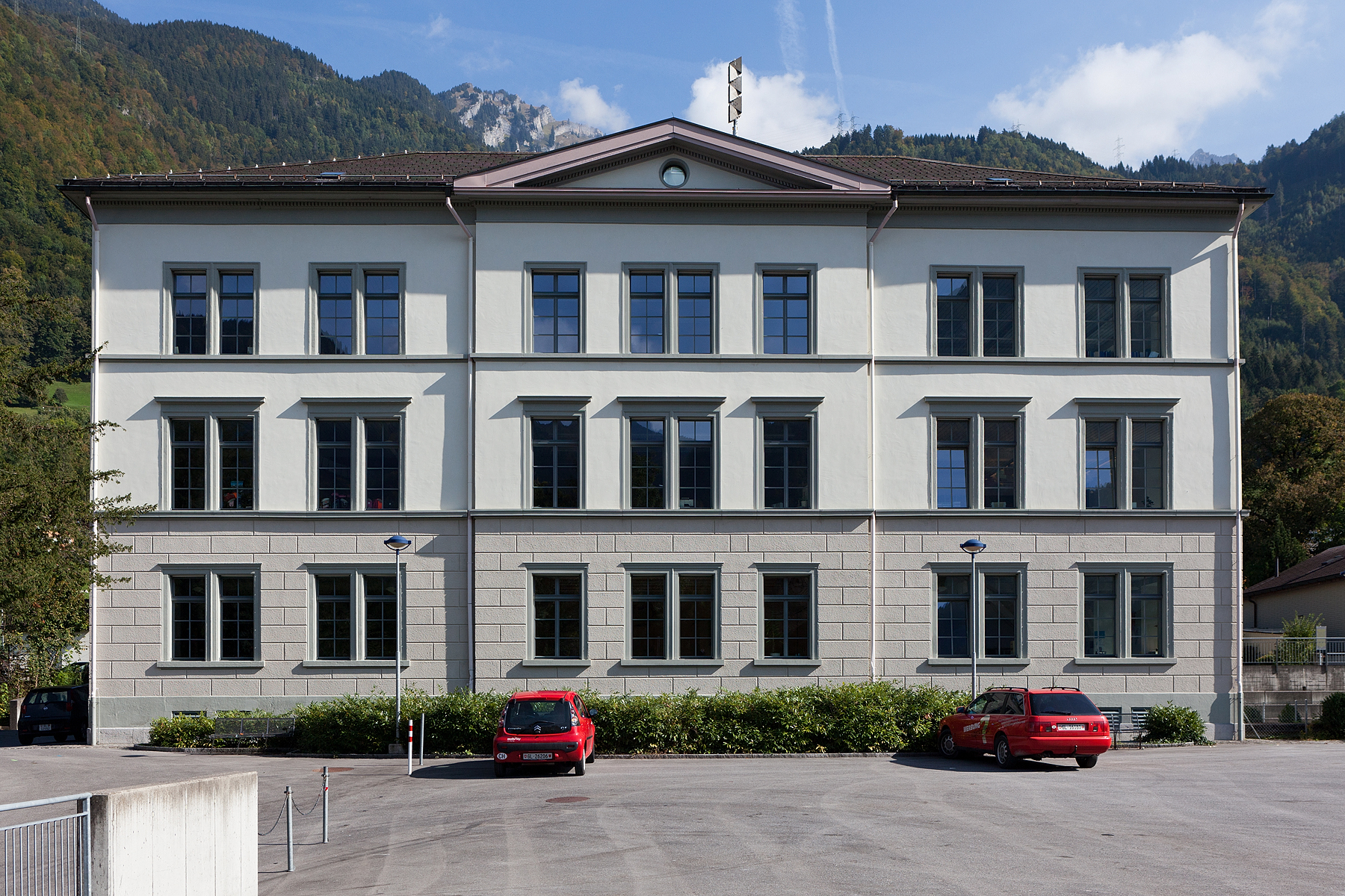 Dorfschulhaus in Mollis (GL)